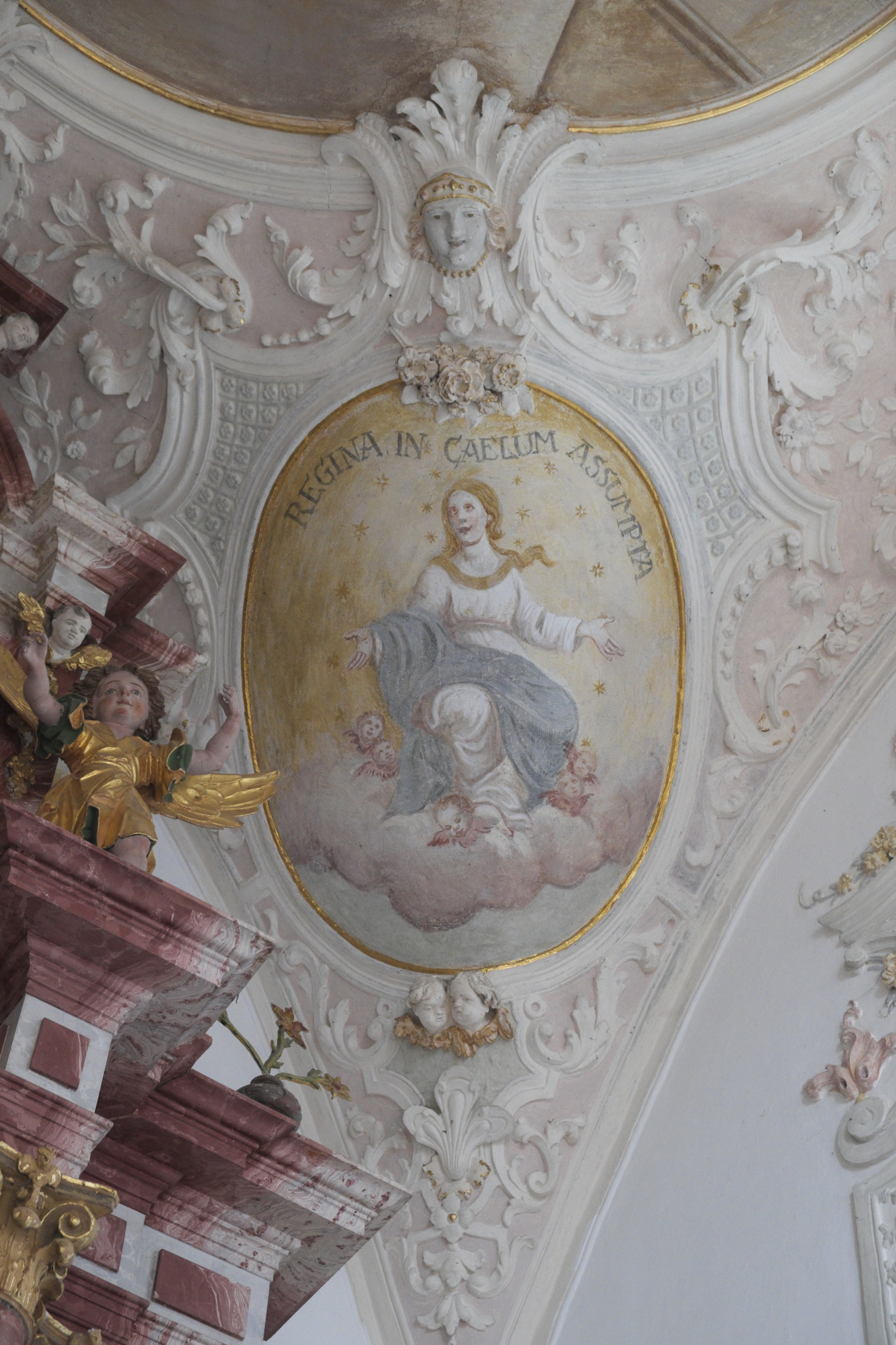 Katholische Filialkirche Unsere Liebe Frau in Petzenhausen, einem Ortsteil von Weil (Oberbayern) im Landkreis Landsberg am Lech (Bayern/Deutschland), Stuckdekor im Chor von Franz Schmuzer, von 1736/38, Deckenbilder aus dem 19./20. Jahrhundert